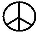 Zelf getekend vredesteken, ik hoop dat het genoeg lijkt, vervang het anders vooral.